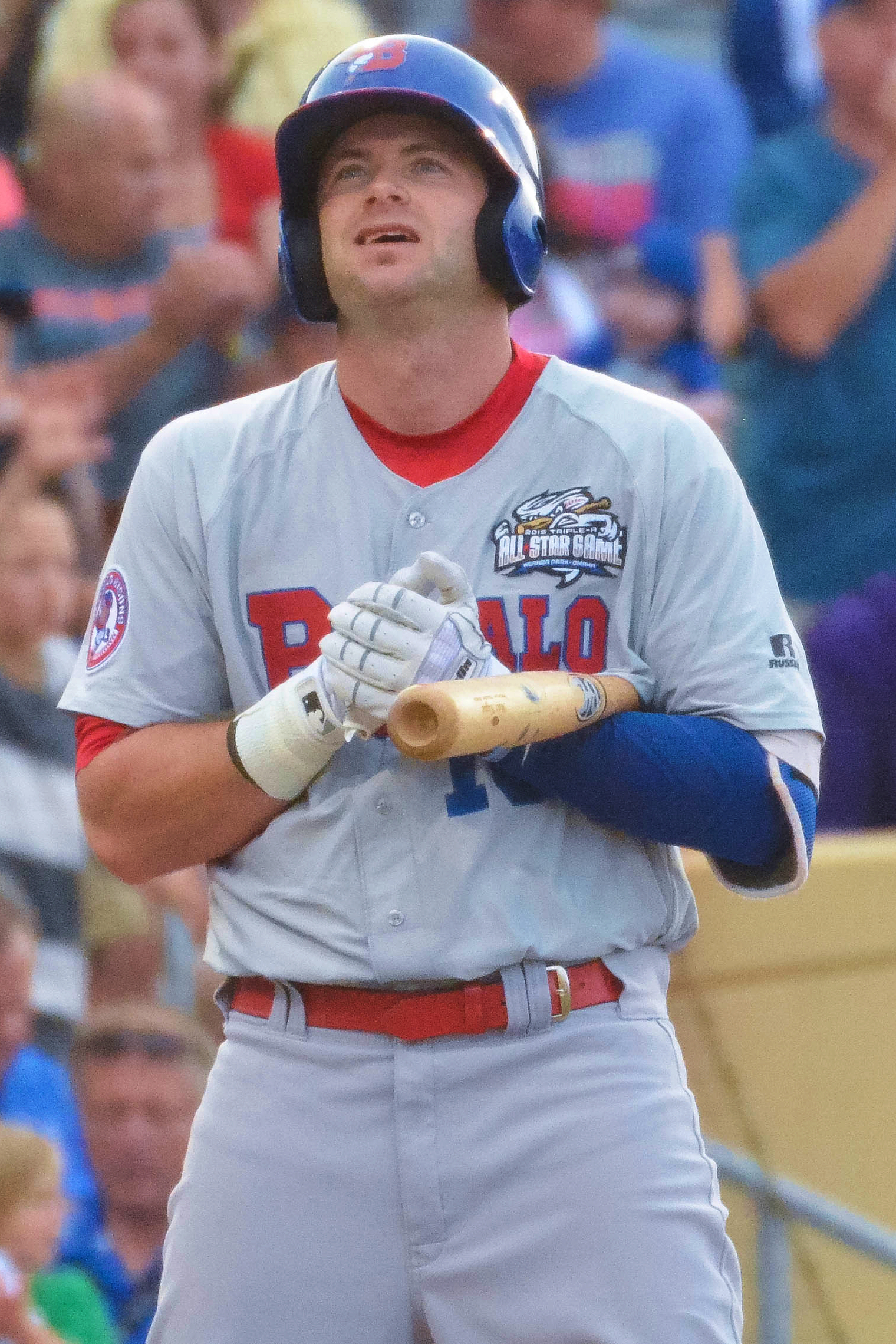 Matt Hague